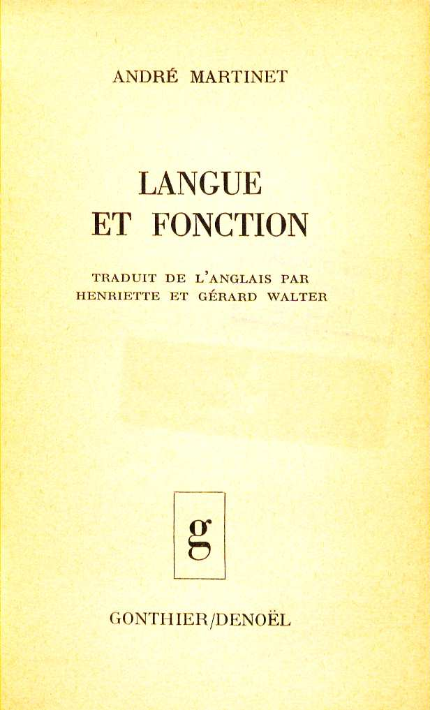 André Martinet: Langue et fonction. Übersetzung aus dem Englischen ins Französische Henriette Walter, Gerard Walter. Paris : Gonthier/Denoel, 1969 (1971)